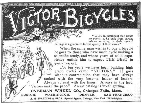 Advertisement